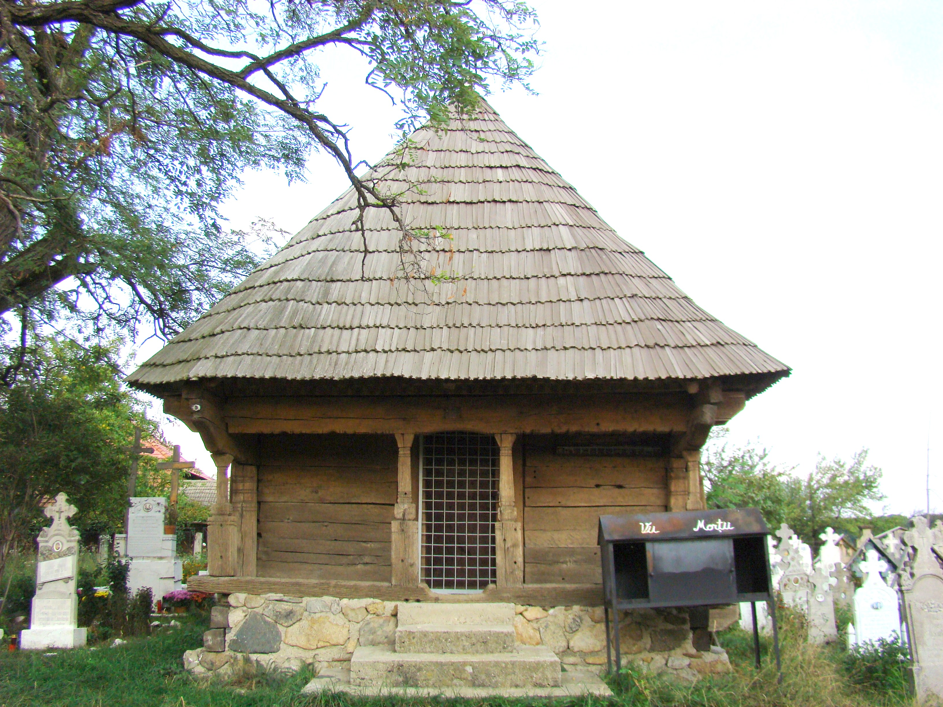 Biserica de lemn „Intrarea în Biserică” din Stâncești-Larga, Gorj